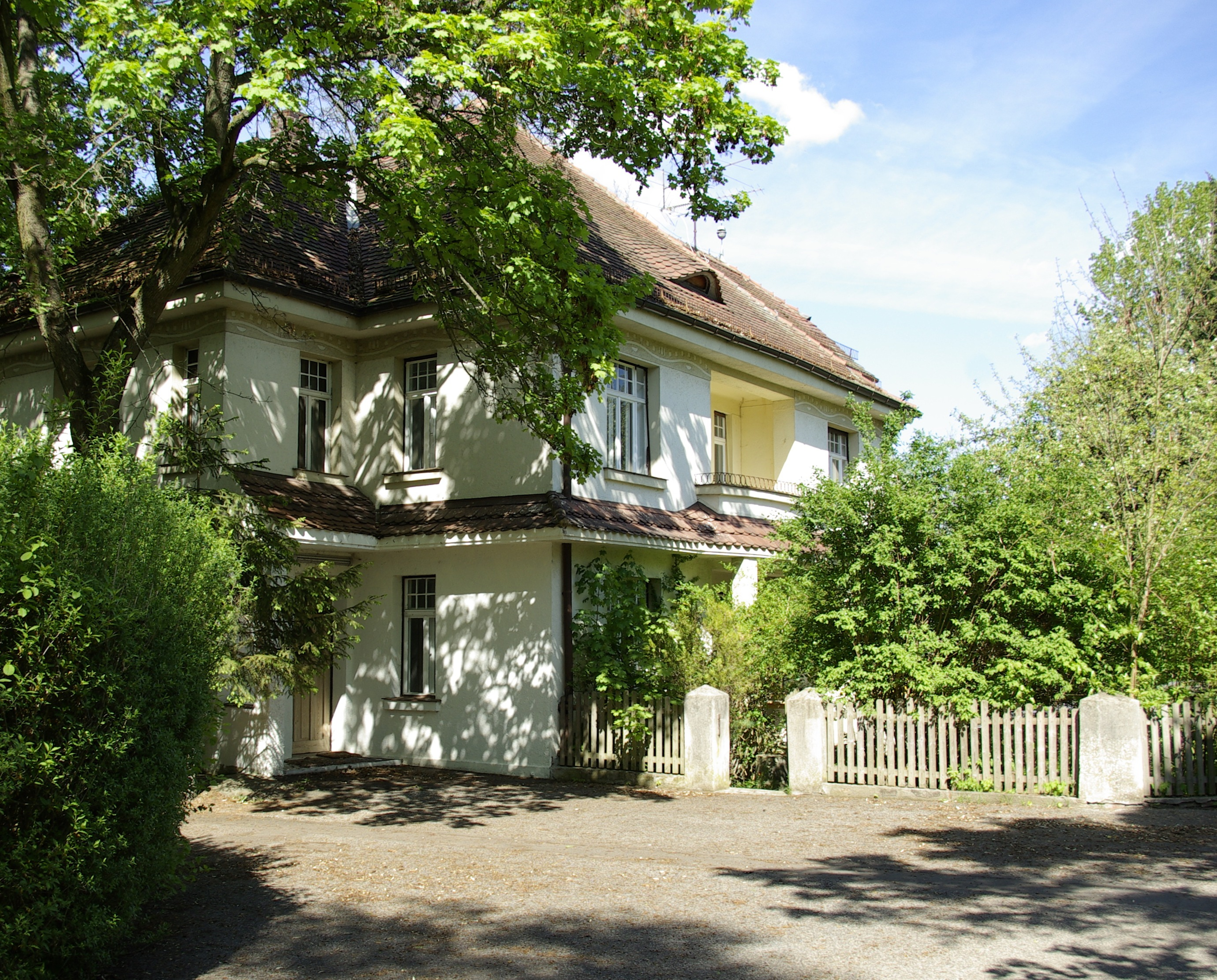 Ehemaligen Fabrikantenvilla (Neumühle 12) in Erlangen.